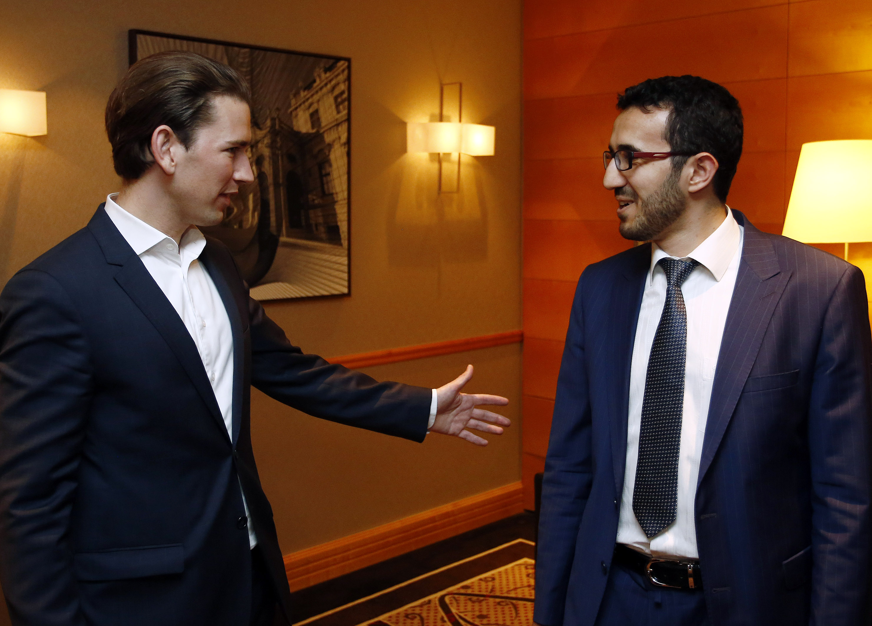 Bundesminister Sebastian Kurz trifft Ibrahim Olgun, den neuen Präsidenten der islamischen Glaubensgemeinschaft in Österreich. Wien, 28.06.2016, Foto: Dragan Tatic